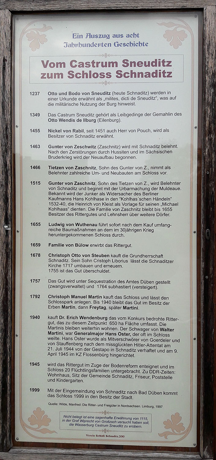 Schloss Schnaditz Historie